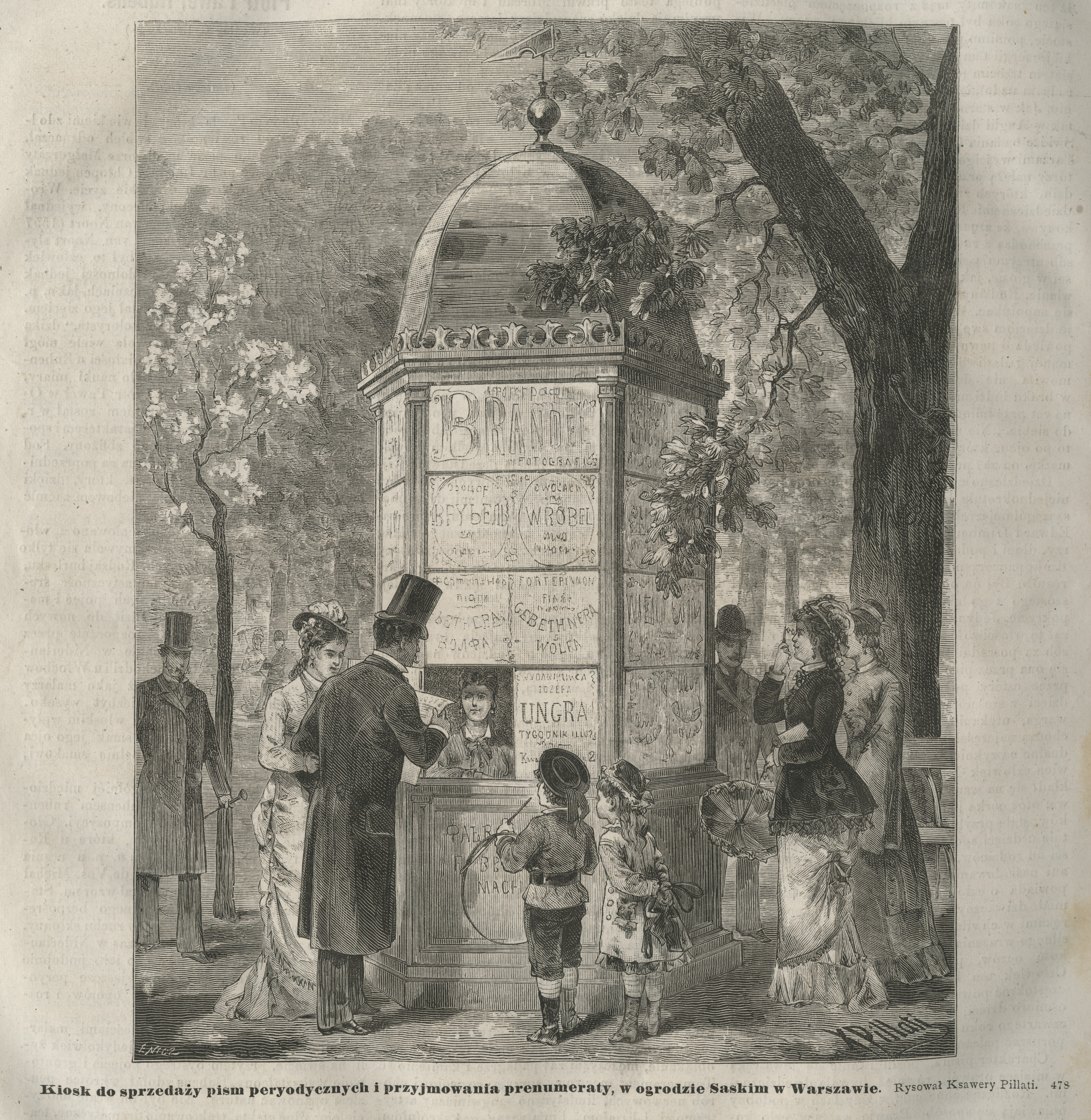 Kiosk do sprzedaży pism peryodycznych i przyjmowania prenumeraty, w ogrodzie Saskim w Warszawie